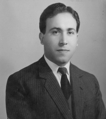 فؤاد الركابي - أول امين سر لحزب البعث العربي الإشتراكي - العراق